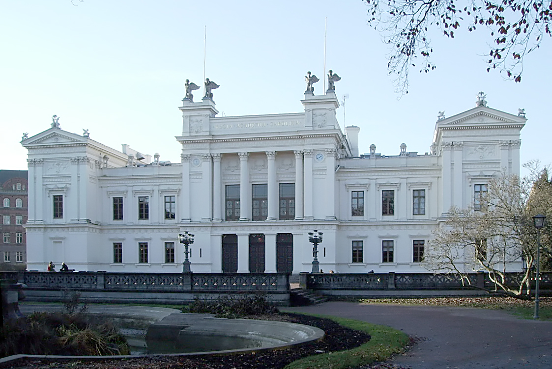 Huvudbyggnaden LU